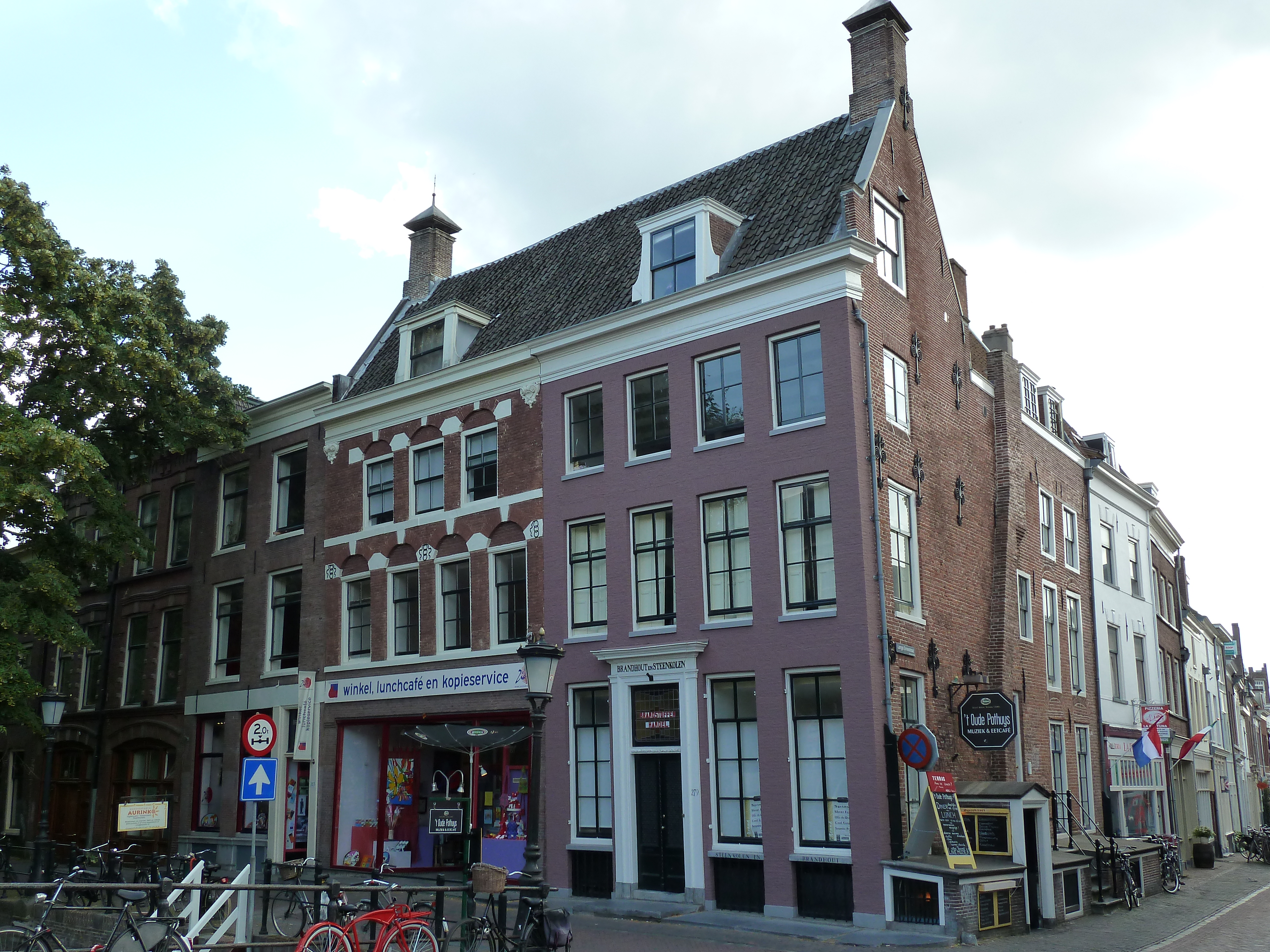 Oudegracht 279, Utrecht, NL.